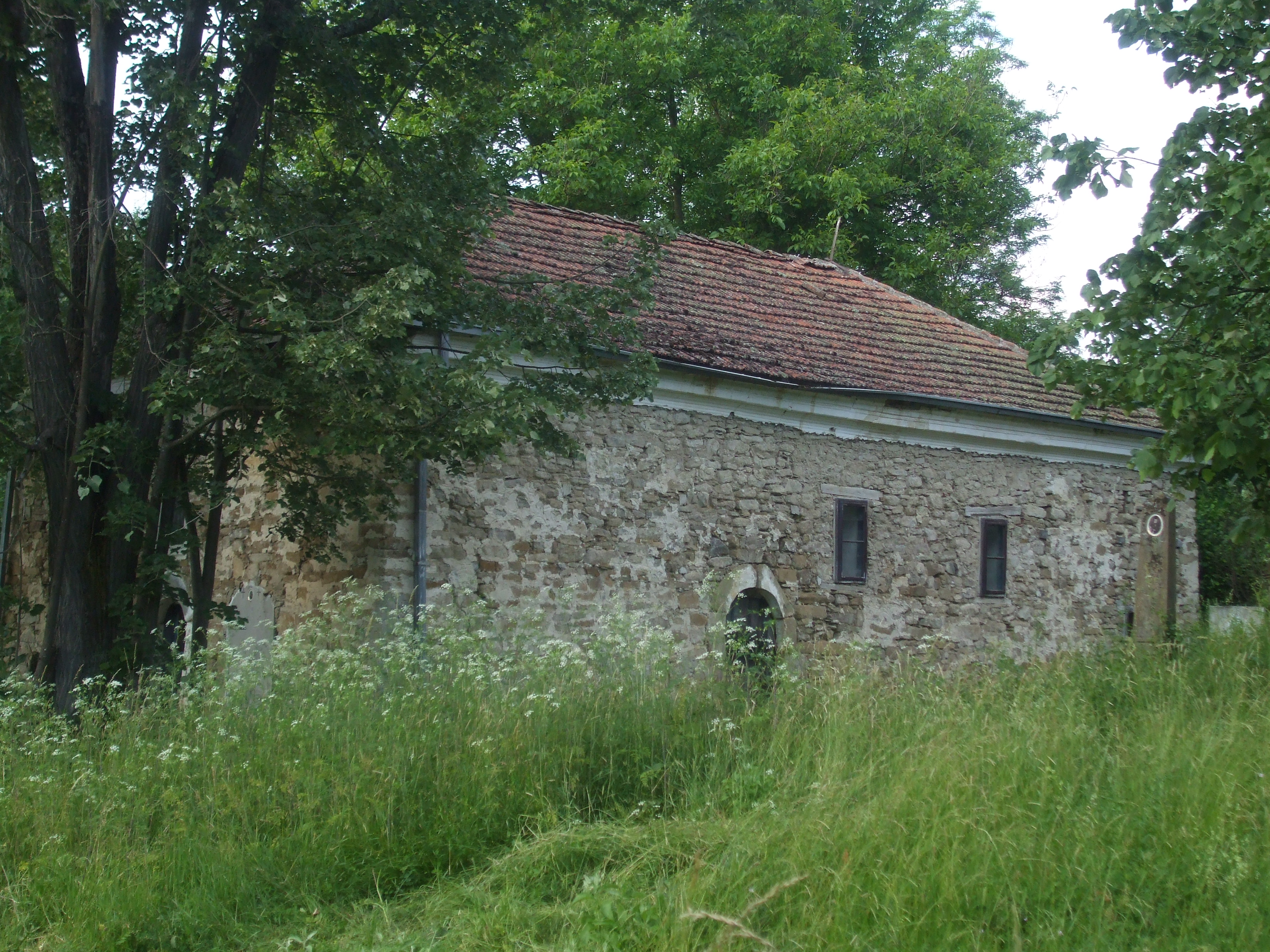 Црква Светог Николе. Снимио Драгољуб.